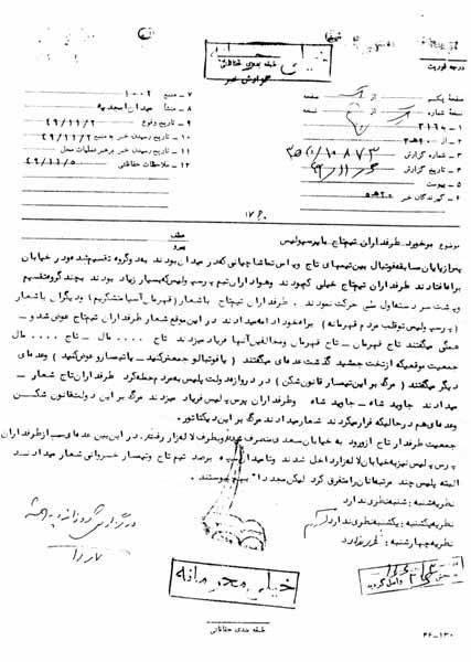 گزارش ساواک دربارۀ شعارهای هواداران پرسپولیس و استقلال در میدان امجدیه، به تاریخ ۲ بهمن ۱۳۴۹. شماره گزارش: ۲۰/۱۰۸۷۳هـ۳ تاریخ گزارش: ۶ بهمن ۱۳۴۹